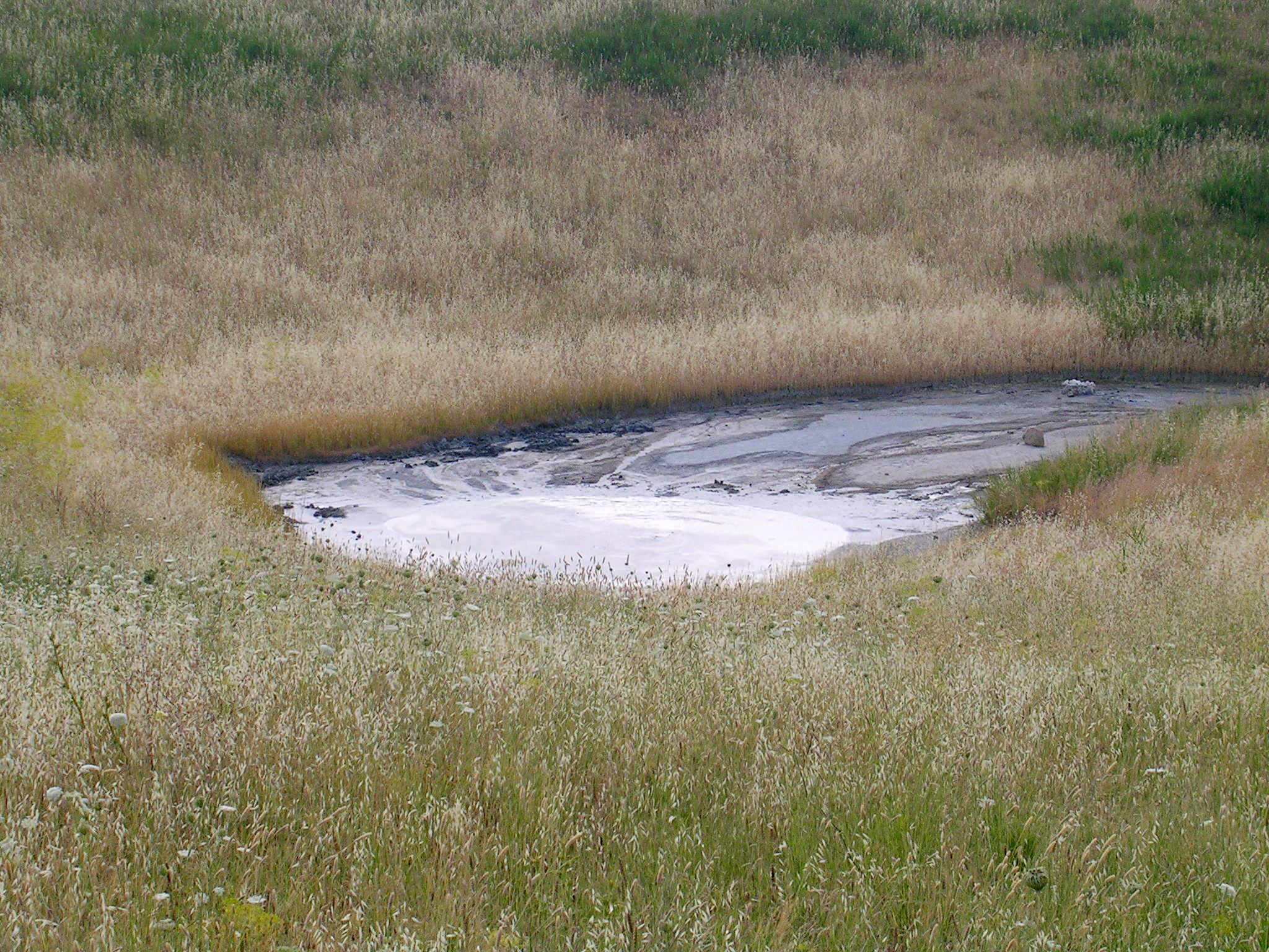 Maccalube (Abbisso) di Cianciana